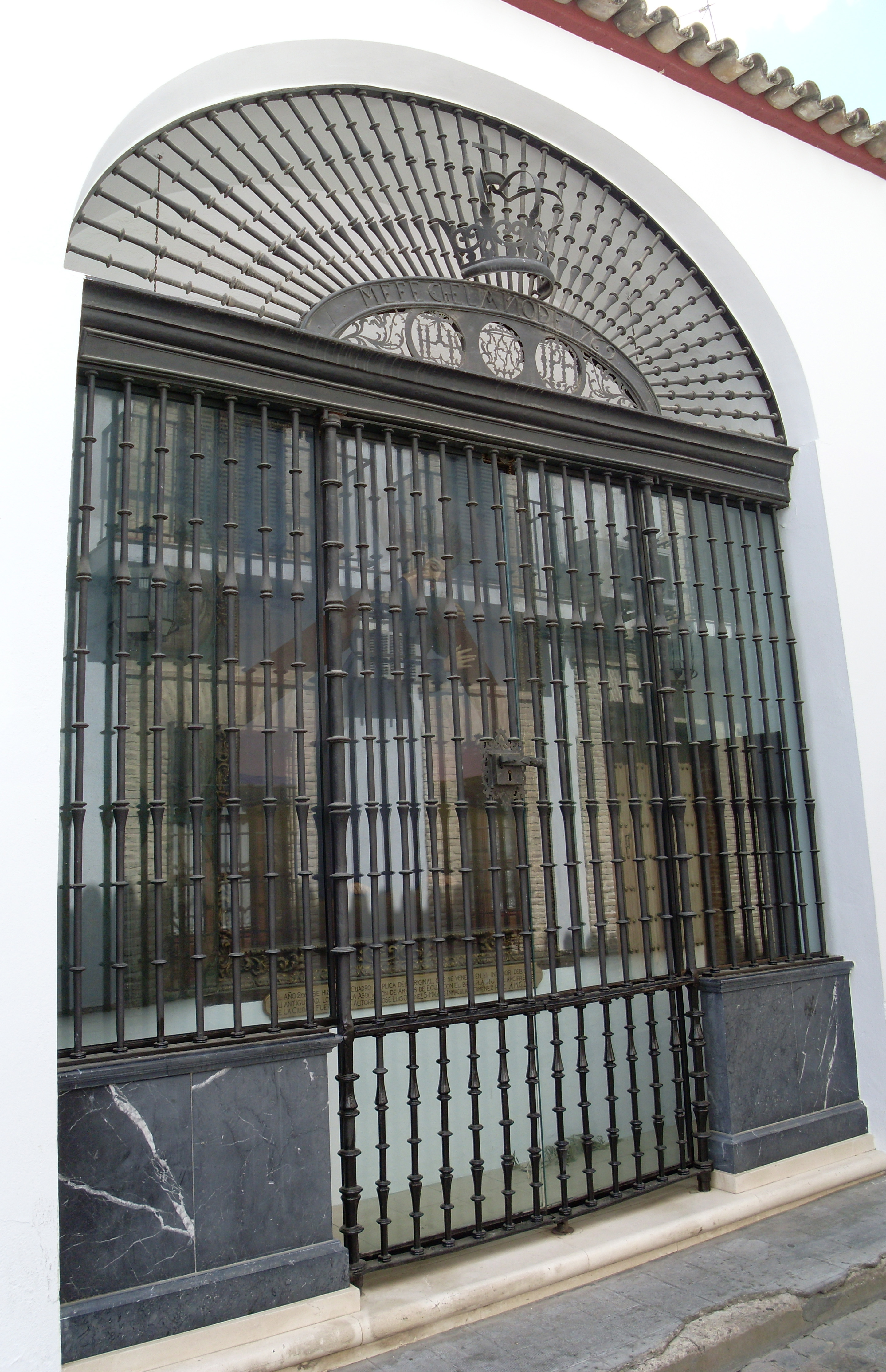 Capilla de Jesús sin Soga de Écija.